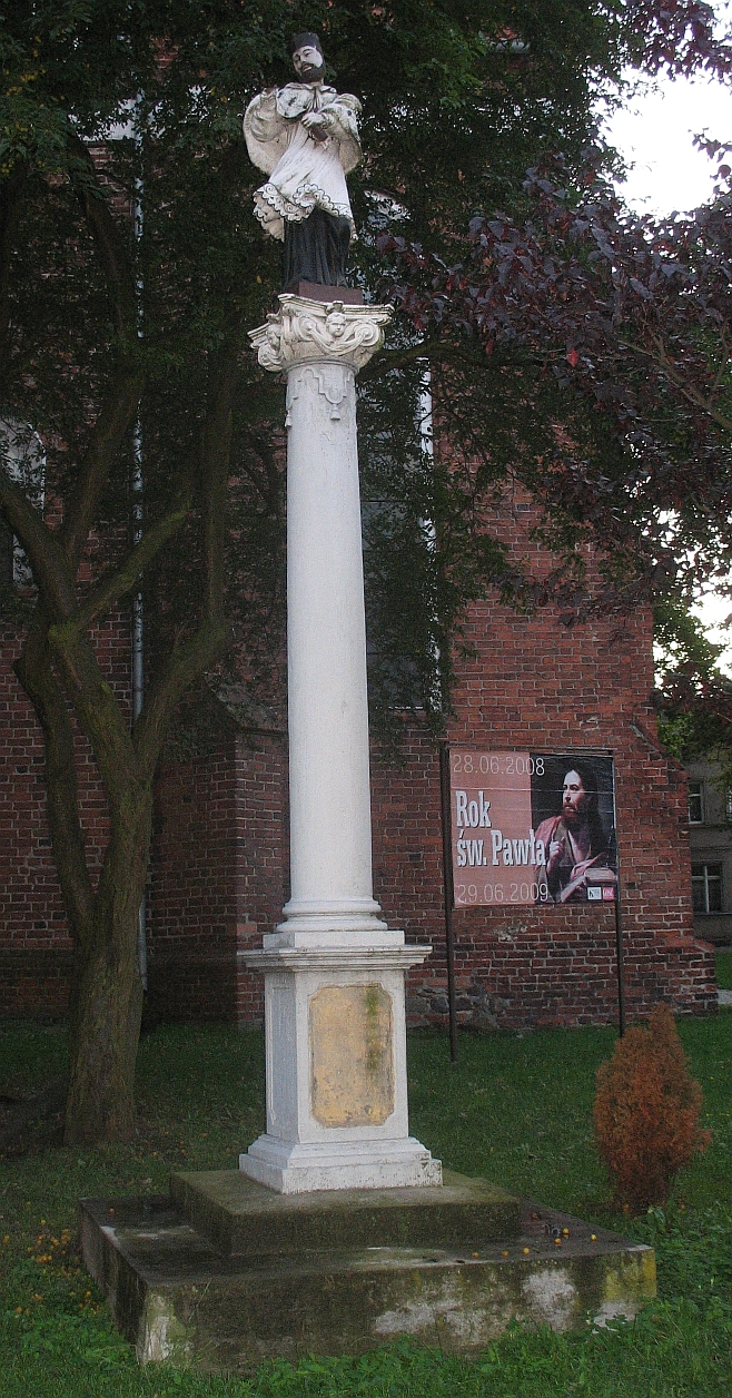 Gniew - kolumna św. Jana Nepomucena